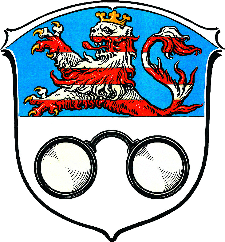 Wappen von Bischofsheim (Mainspitze)